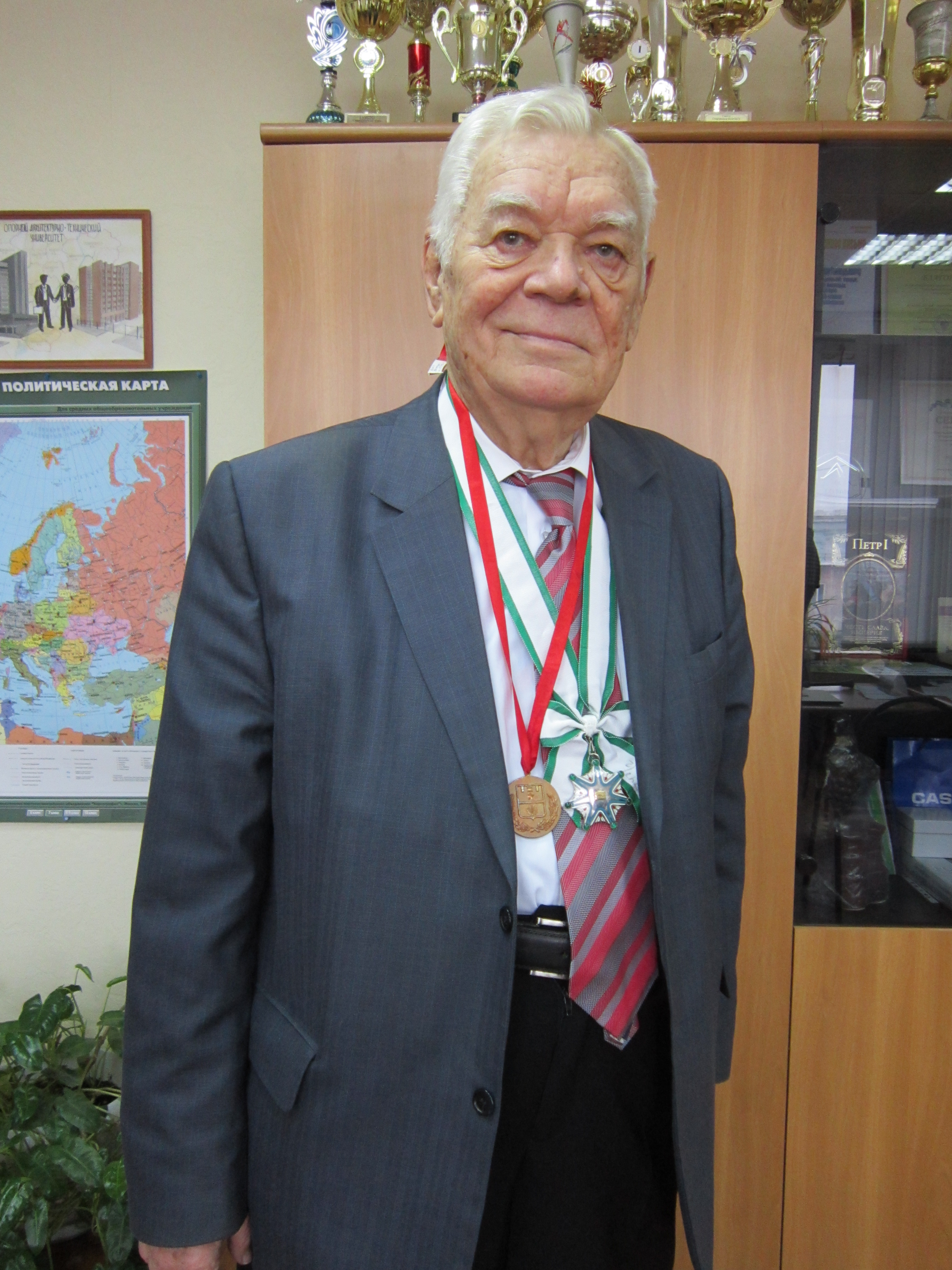 Атопов Владимир Иванович